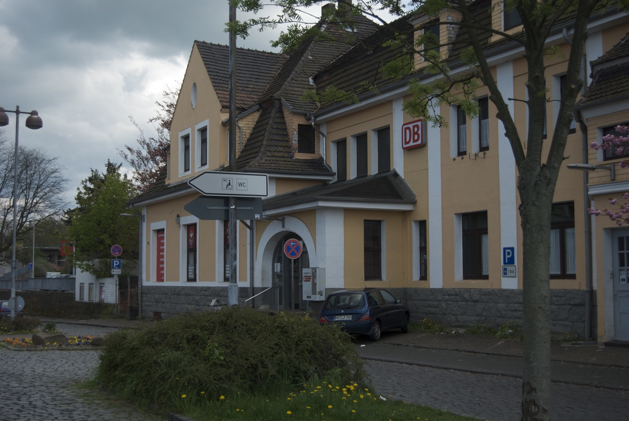 Bahnhof Treysa, Schwalmstadt, Hessen, Deutschland. Ansicht vom Busbahnhof aus.